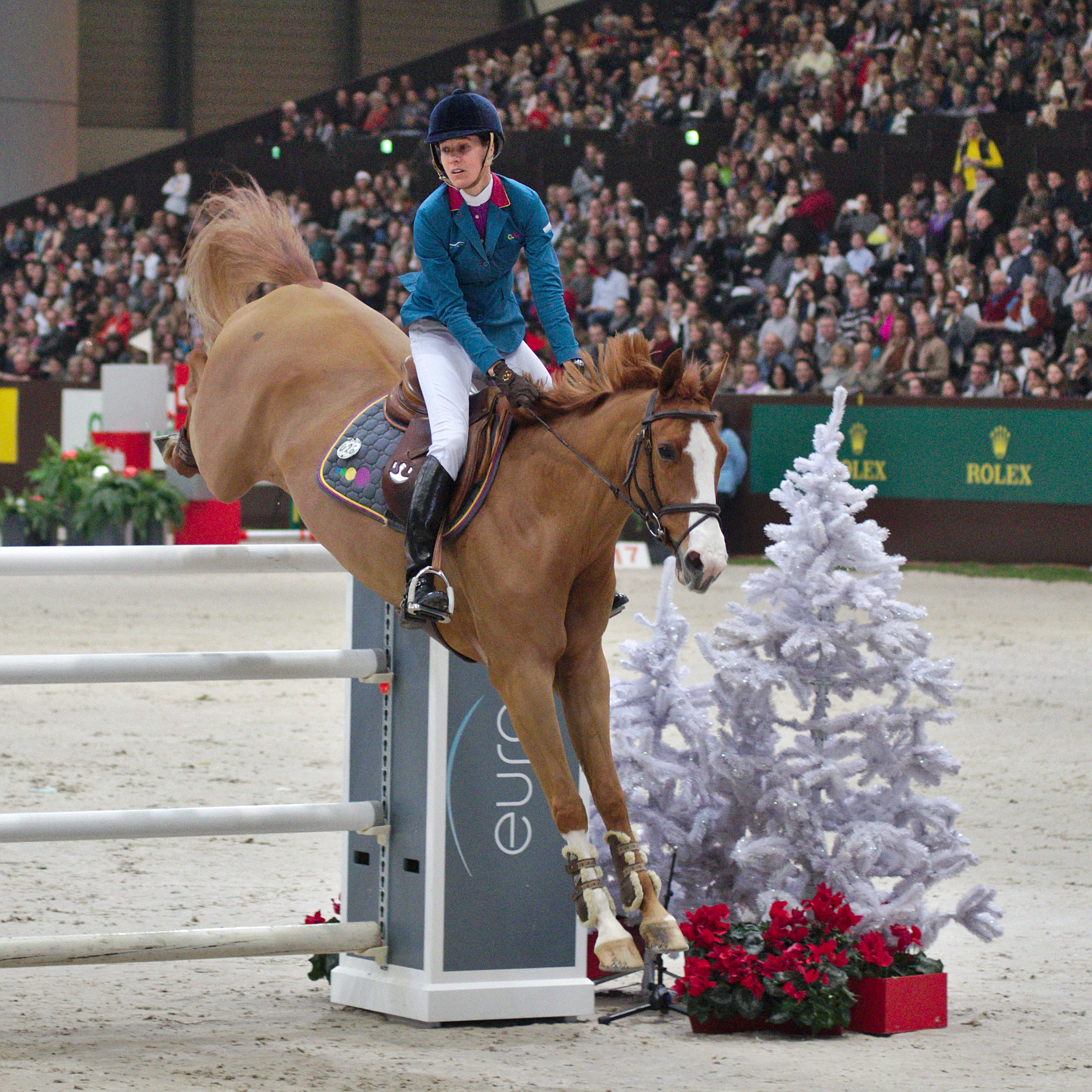 CHI Genève 2013 - 20131214 - Luciana Diniz et Fit for Fun 13